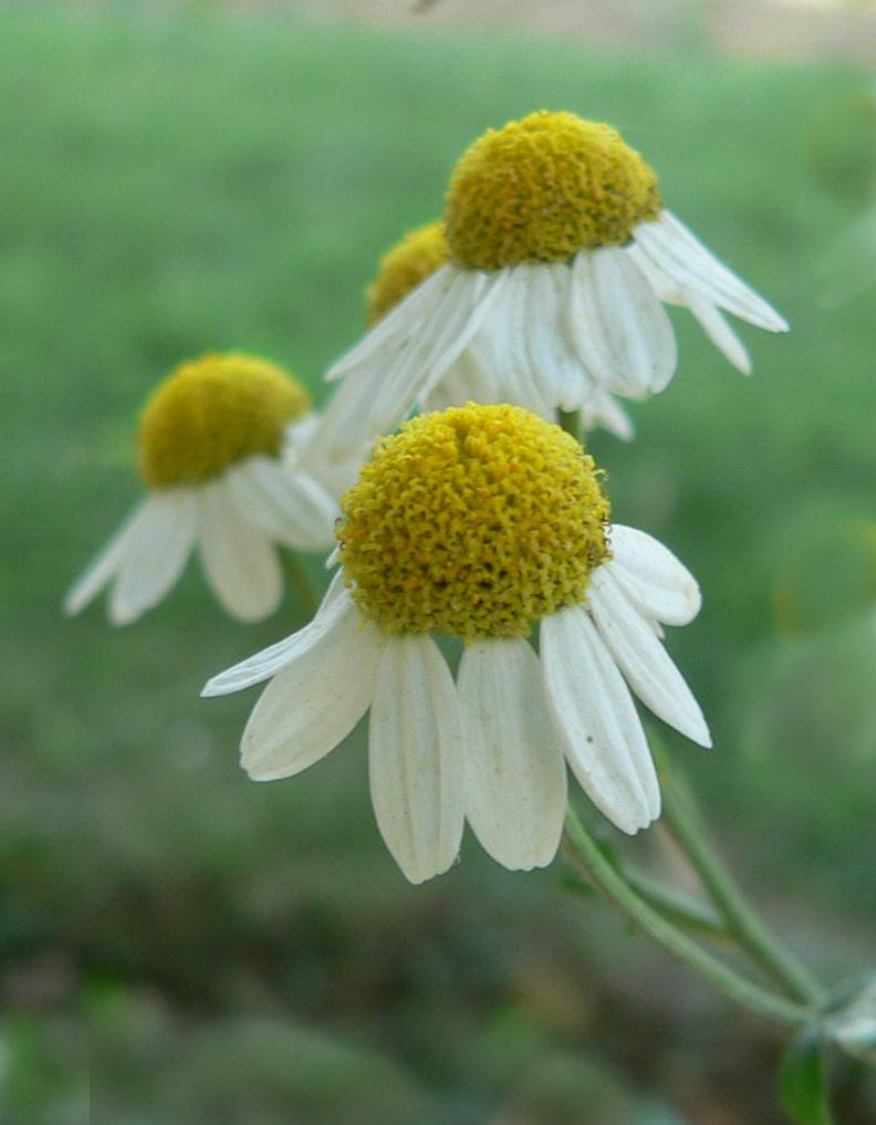 Tanacetum parthenium, Jardin des Plantes de Paris